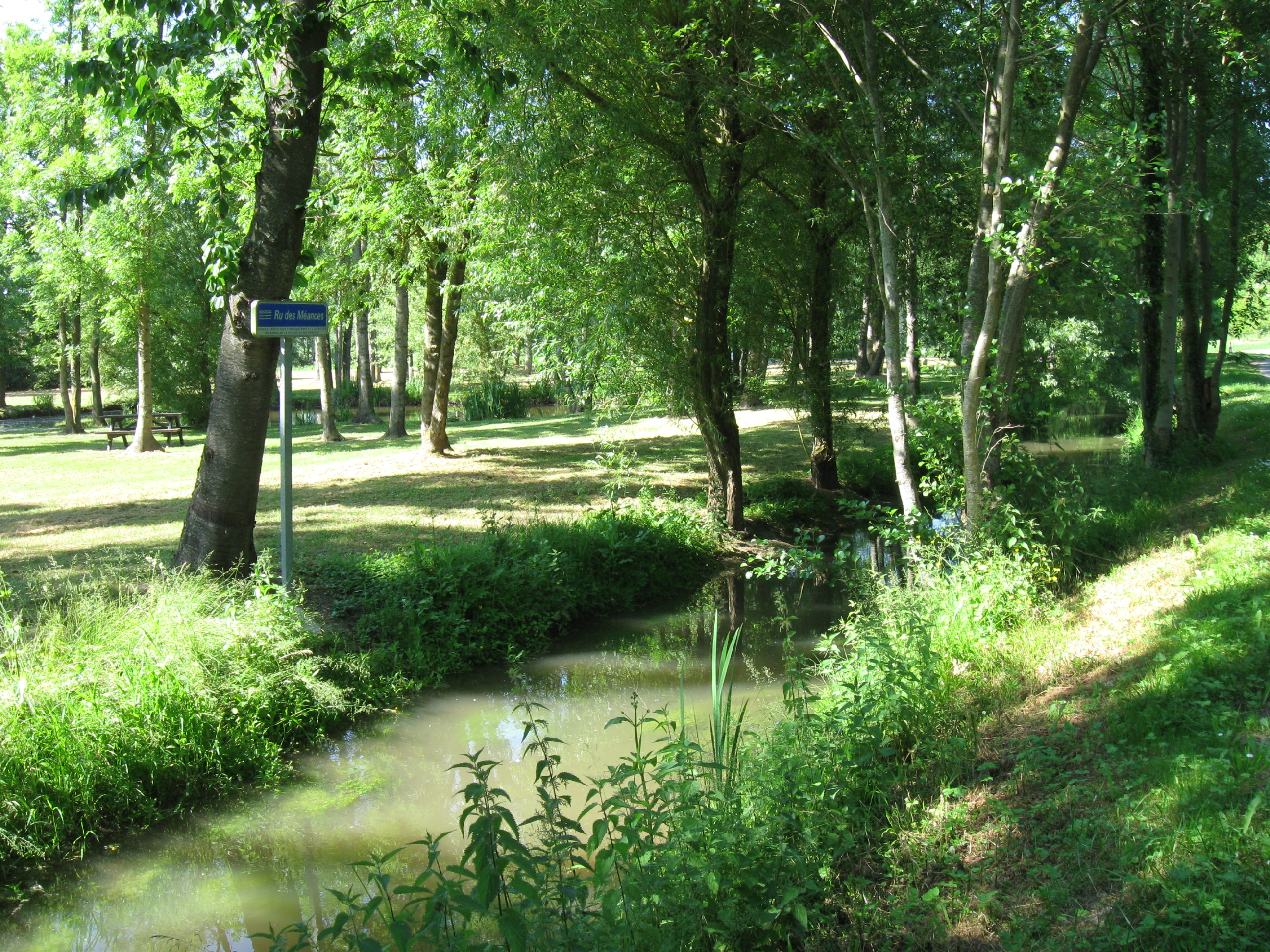 Ru des Méances à Chalmaison. (Seine-et-Marne, région Île-de-France).